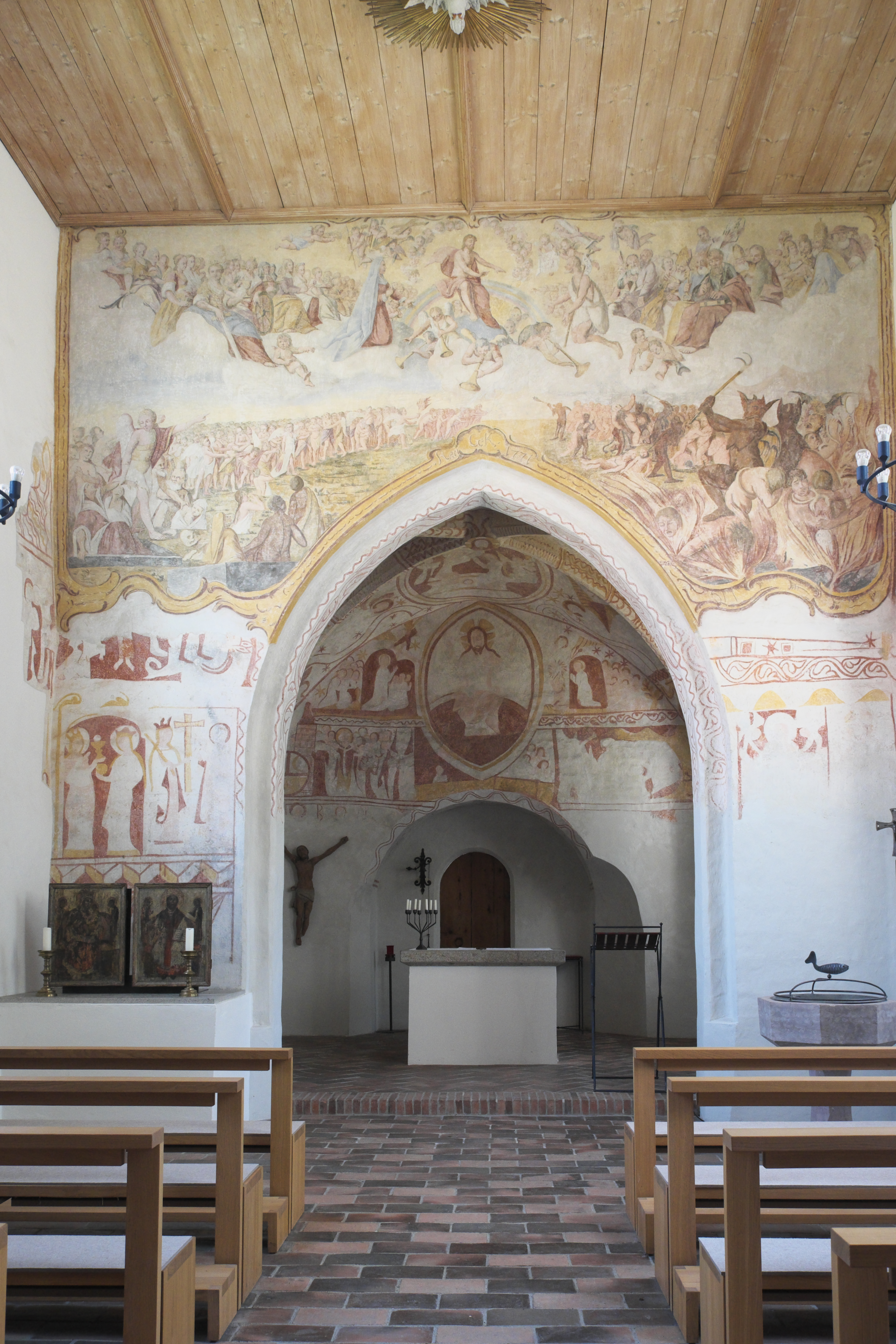 Alte katholische Pfarrkirche St. Georg in Obermenzing im Stadtbezirk Pasing-Obermenzing in München (Bayern/Deutschland), Innenraum